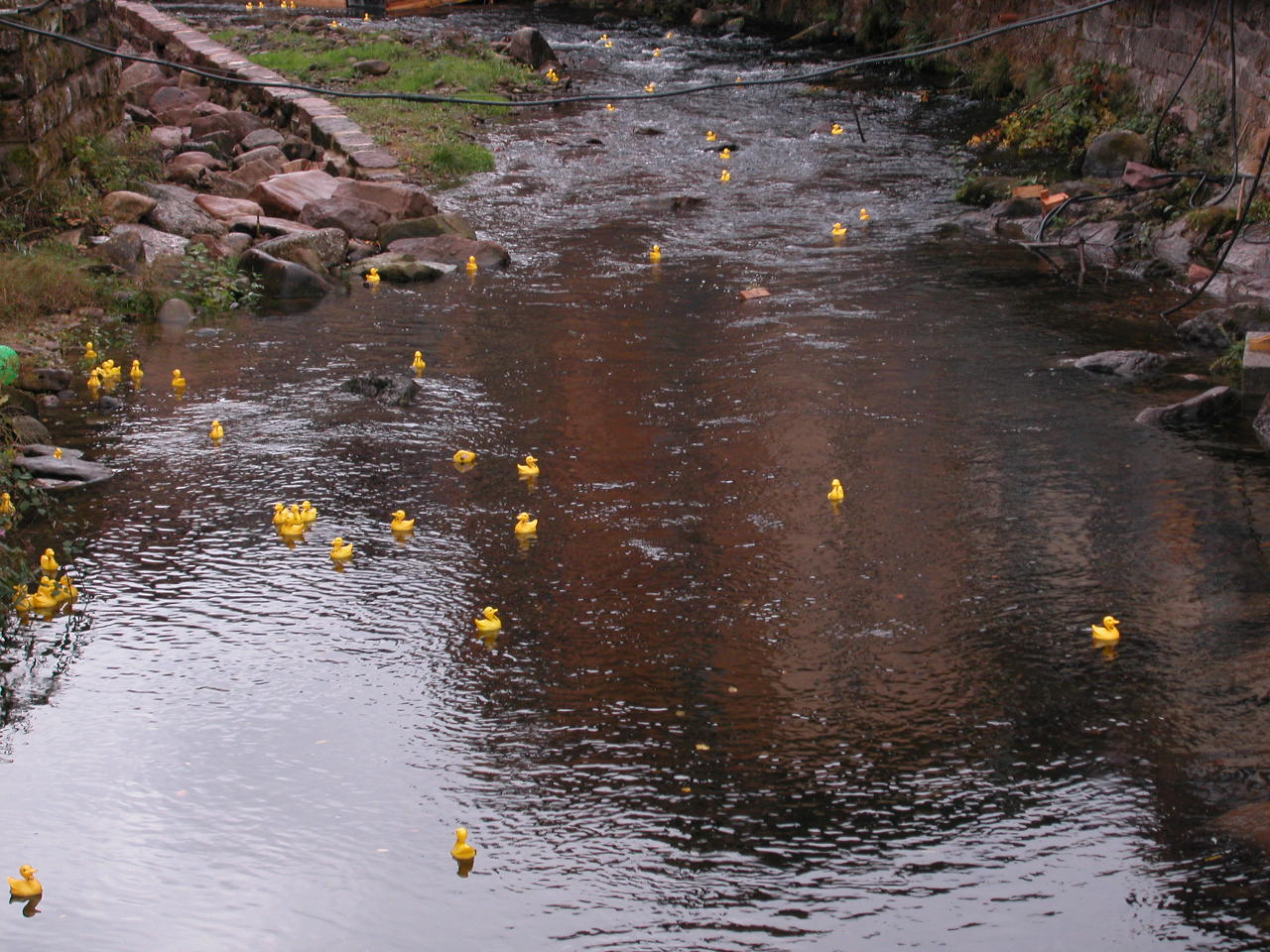 Enz in Bad Wildbad